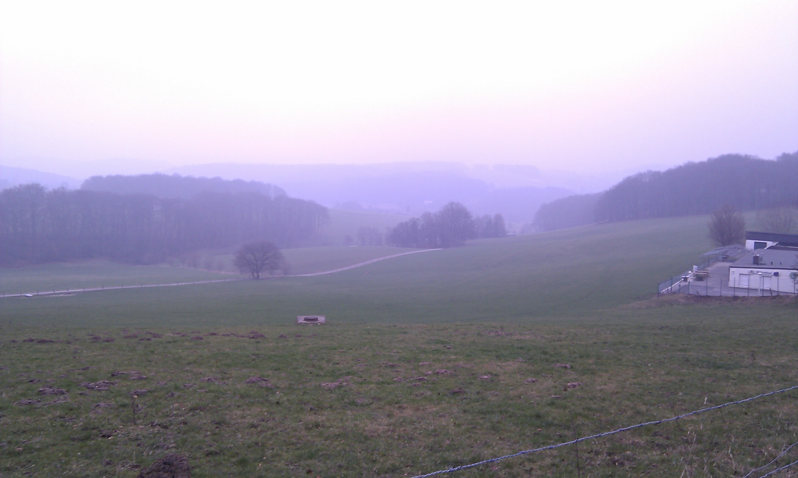 Blick vom Nordosten Dönbergs auf den Winterberger Weg.